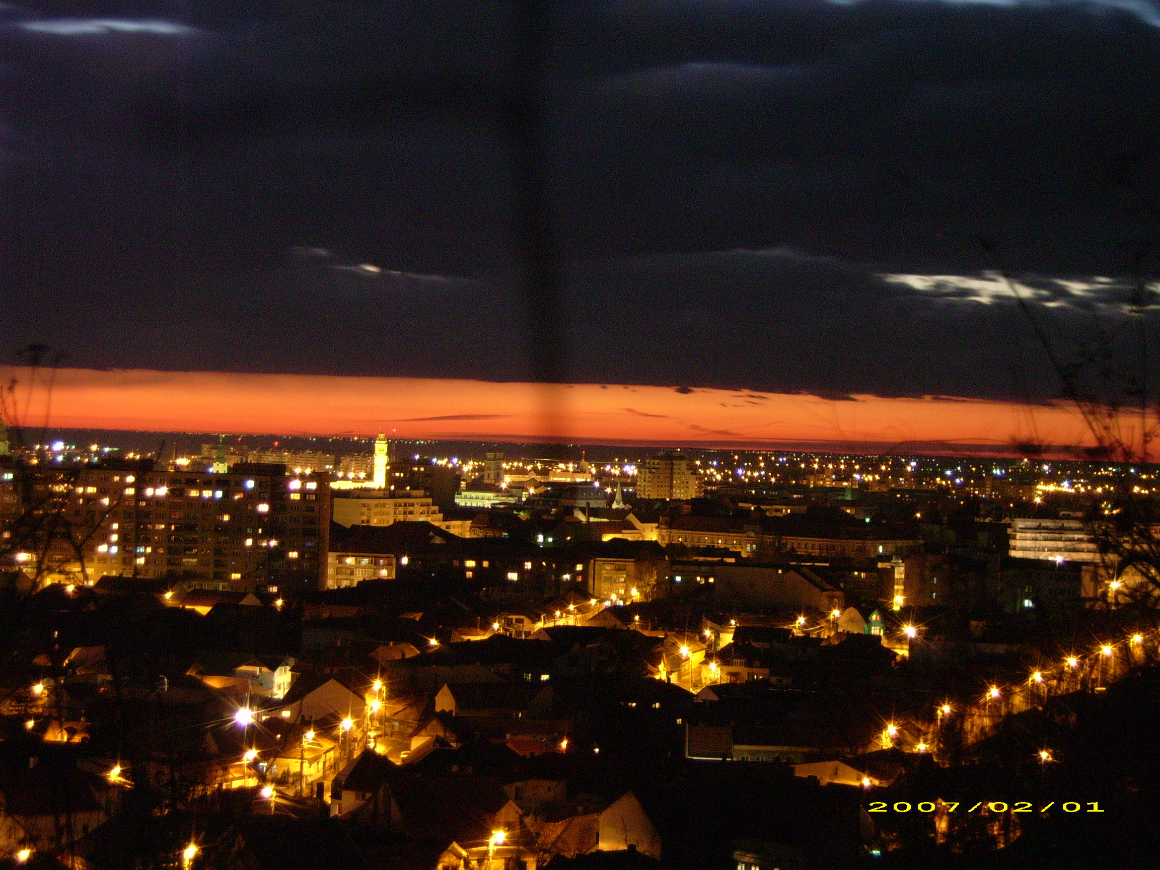 Vedere de pe dealul ciuperca asupra Oradiei 2304*1728 pixel, 96 dpi res vertical &orizontal, bit depth 24, frame count 1, equipment benq dc c800, shutter speed 8 sec, lens aperture f/4.5, focal length 18mm, f-number f/4.4, exposure 8 sec, iso 100, date picture taken 2/1/2007, 6:18